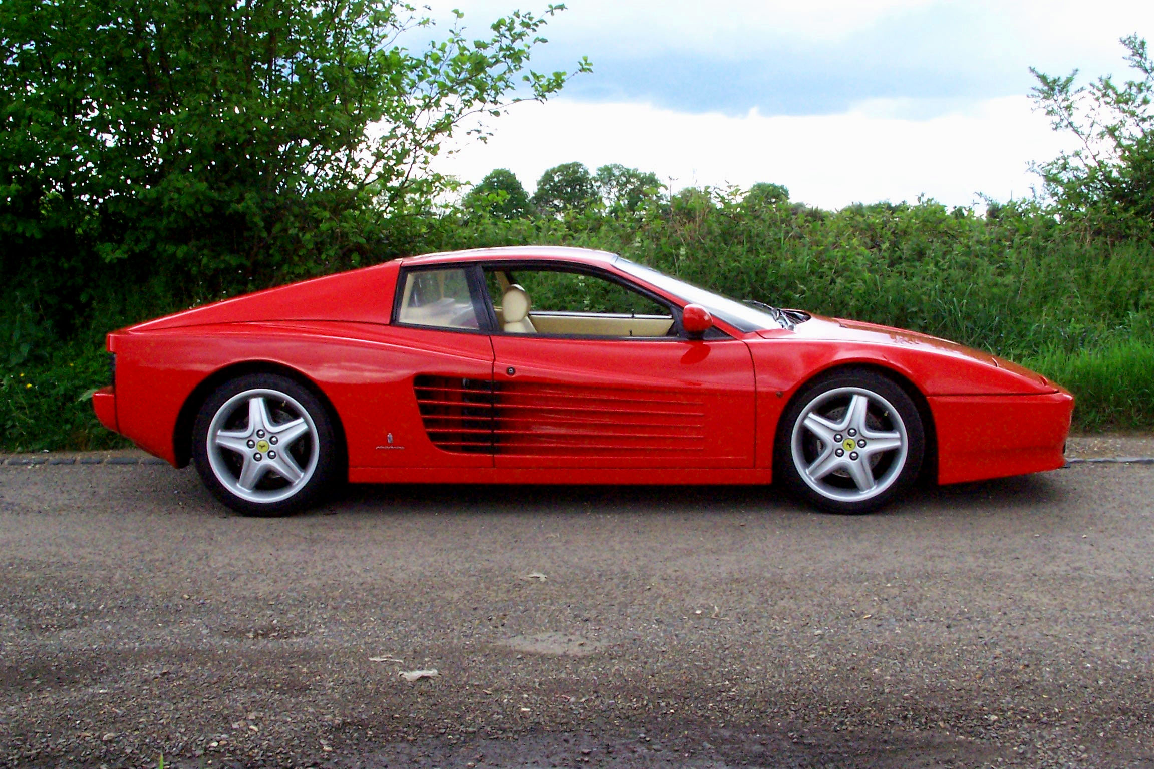 Ferrari 512 TR libre de droit from [1]